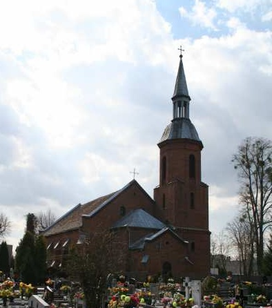 Kościół Ewangelicko-Augsburski w Wołczynie